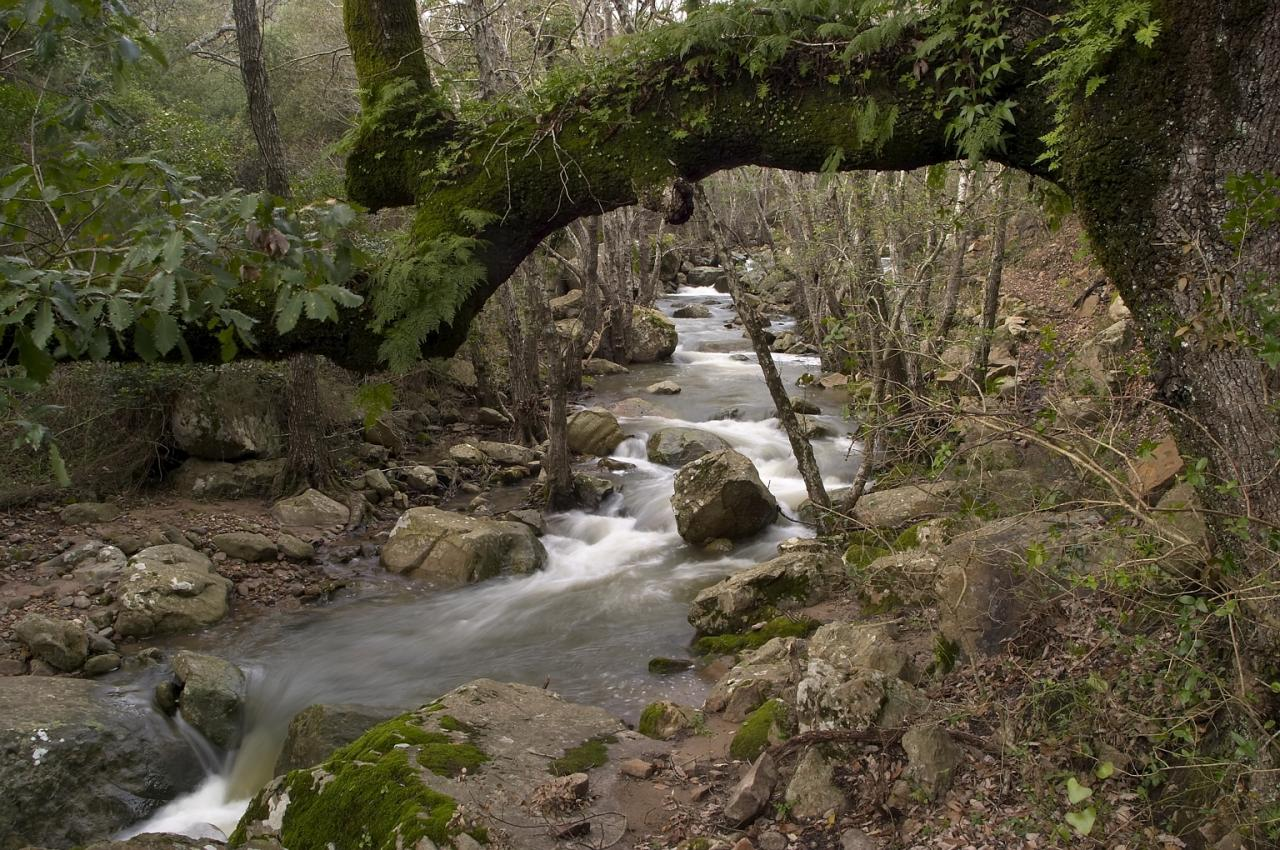 Para Reto 24h. Un agradable paseo por el rio Guadalmesi hace un par de años creo. Me gustaba como la rama del arbol enmarcaba la parte alta de la foto y como el rio me llevaba la vista hacia la parte izquierda de la imagen. Espero que os guste